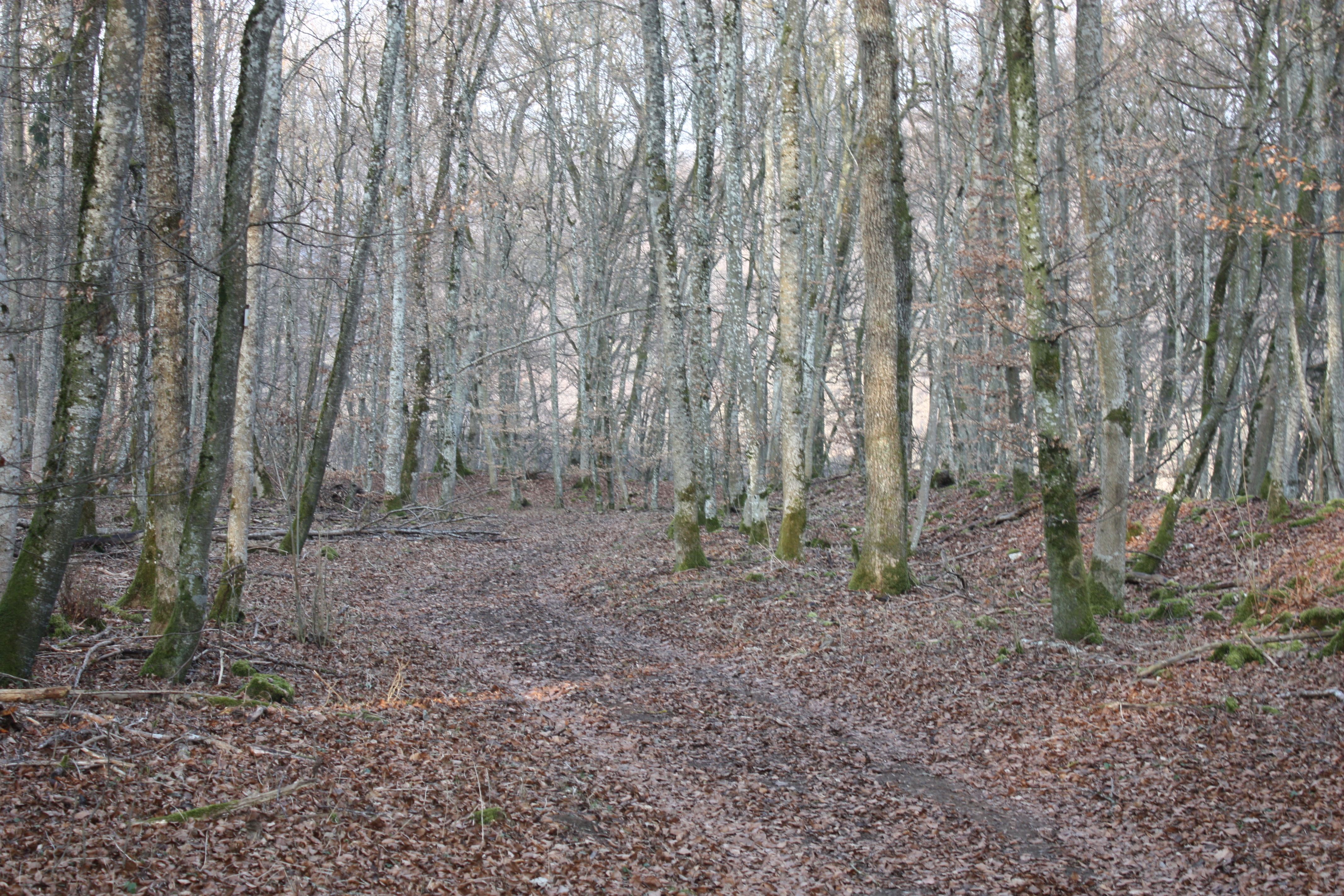 Hochfläche des Ringwalls Burg Alt-Hayingen